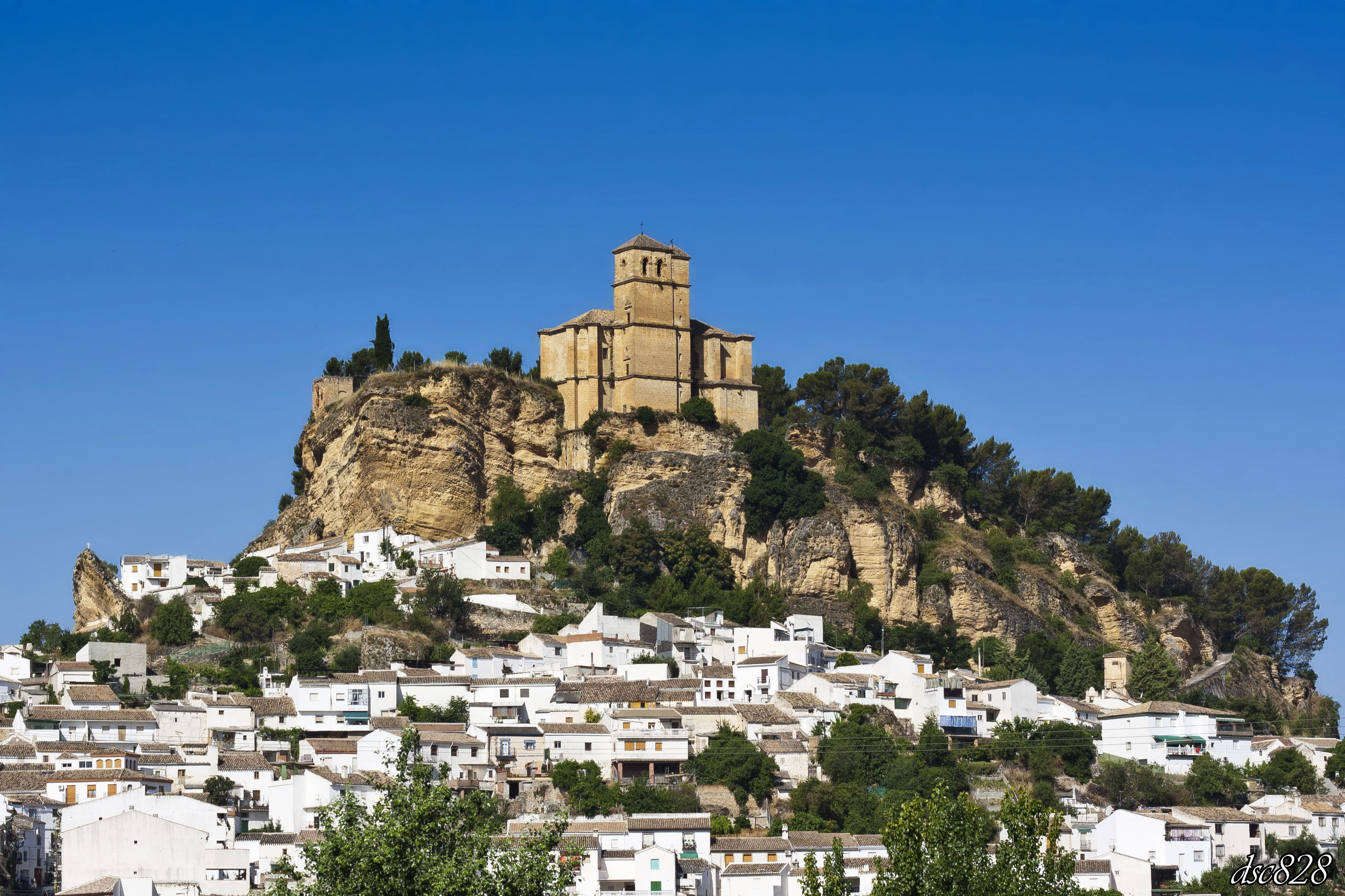 Montefrío, Spain.